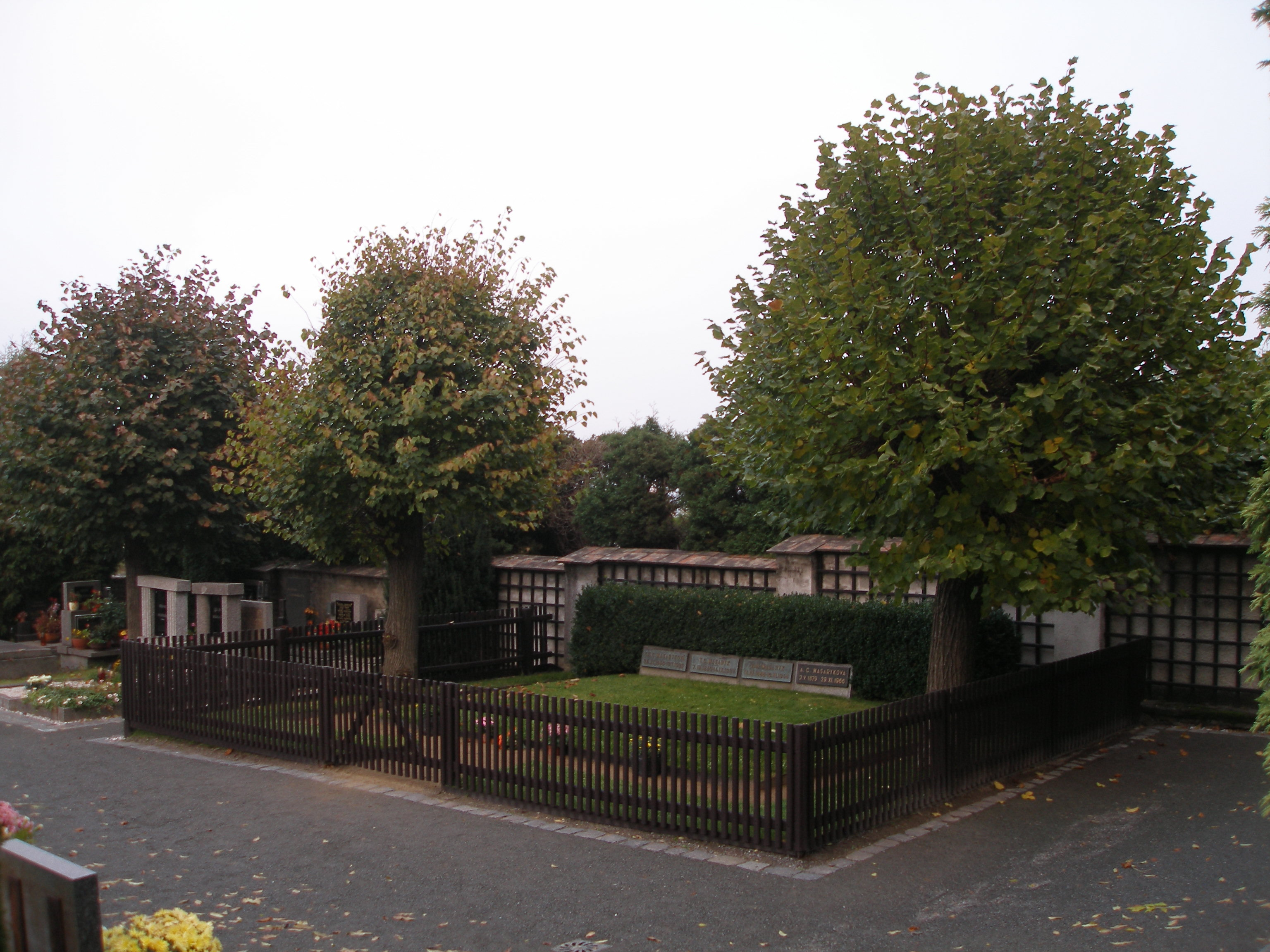 Celkový pohled na hrob Charlotty Garigue Masarykové, Tomáše Garrigue Masaryka, Jana Masaryka a Alice Garigue Masarykové.